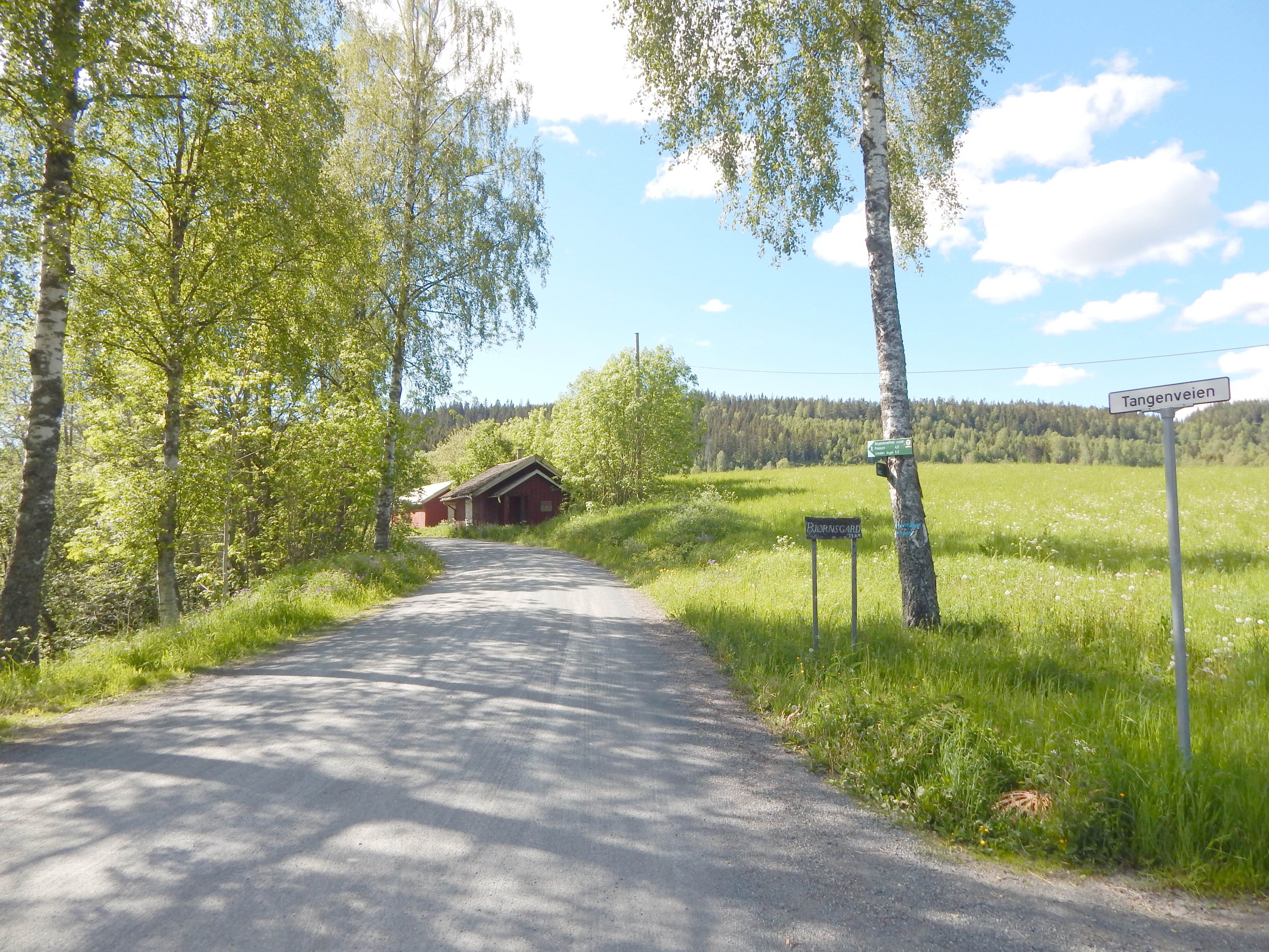 Tangenveien